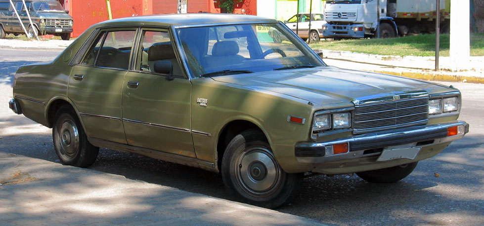 Datsun 200L (Nissan Laurel C231) 1979 in Chile